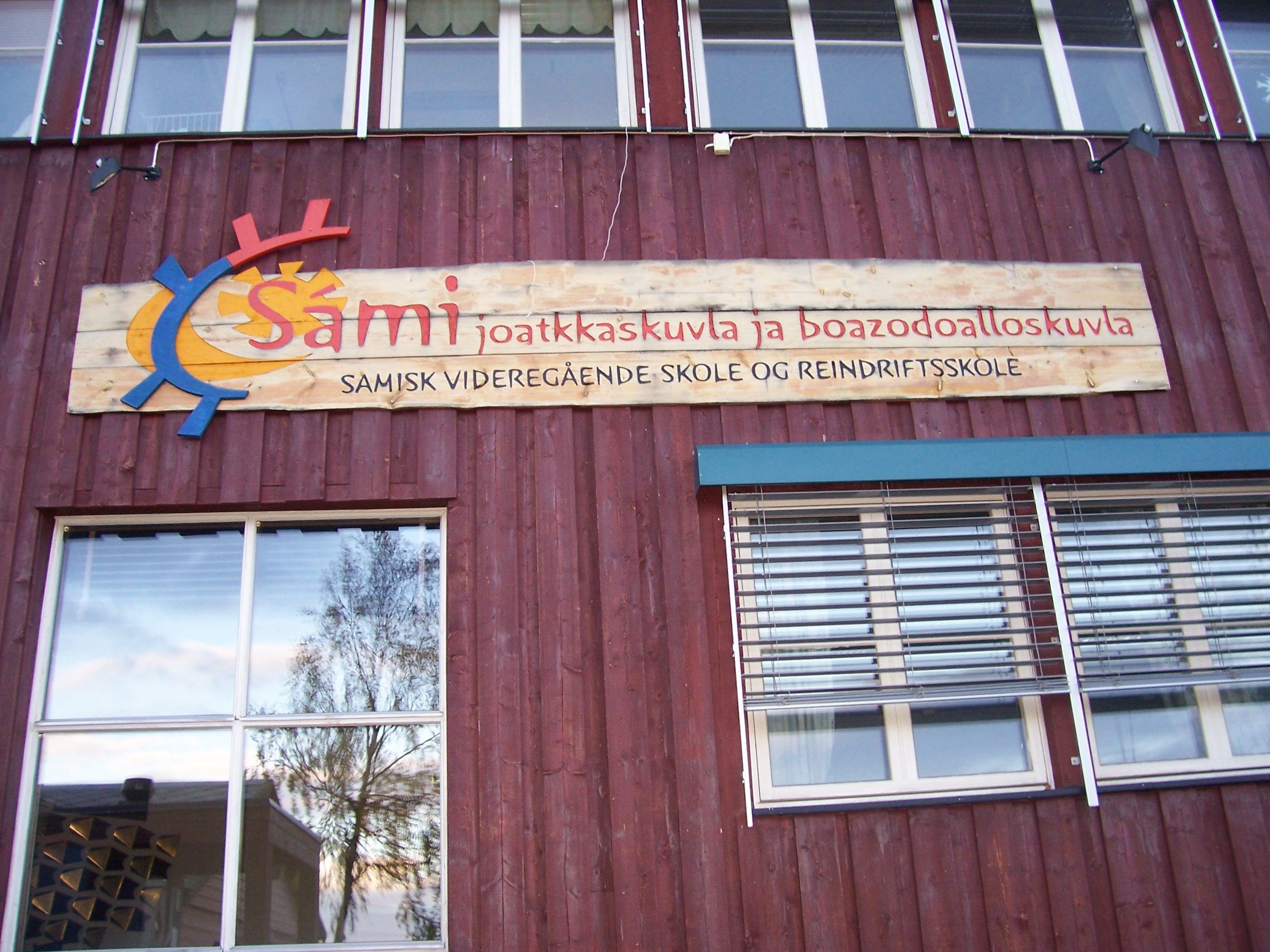 Samisk videregående skole og reindriftsskole i Kautokeino